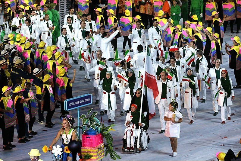 Делегация Ирана на открытии Олимпийских игр в Рио-де-Жанейро